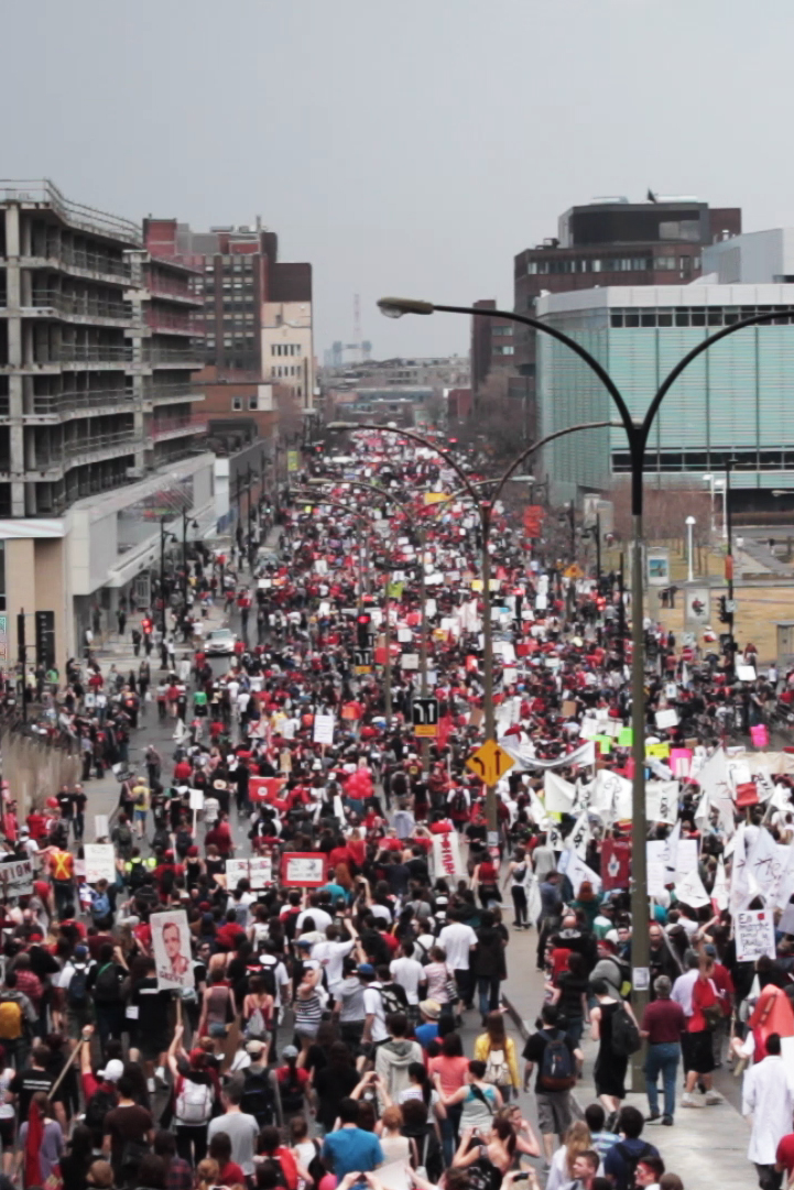 Manifestation contre la hausse des droits de scolarité, 22 mars, rue Berri, Montréal